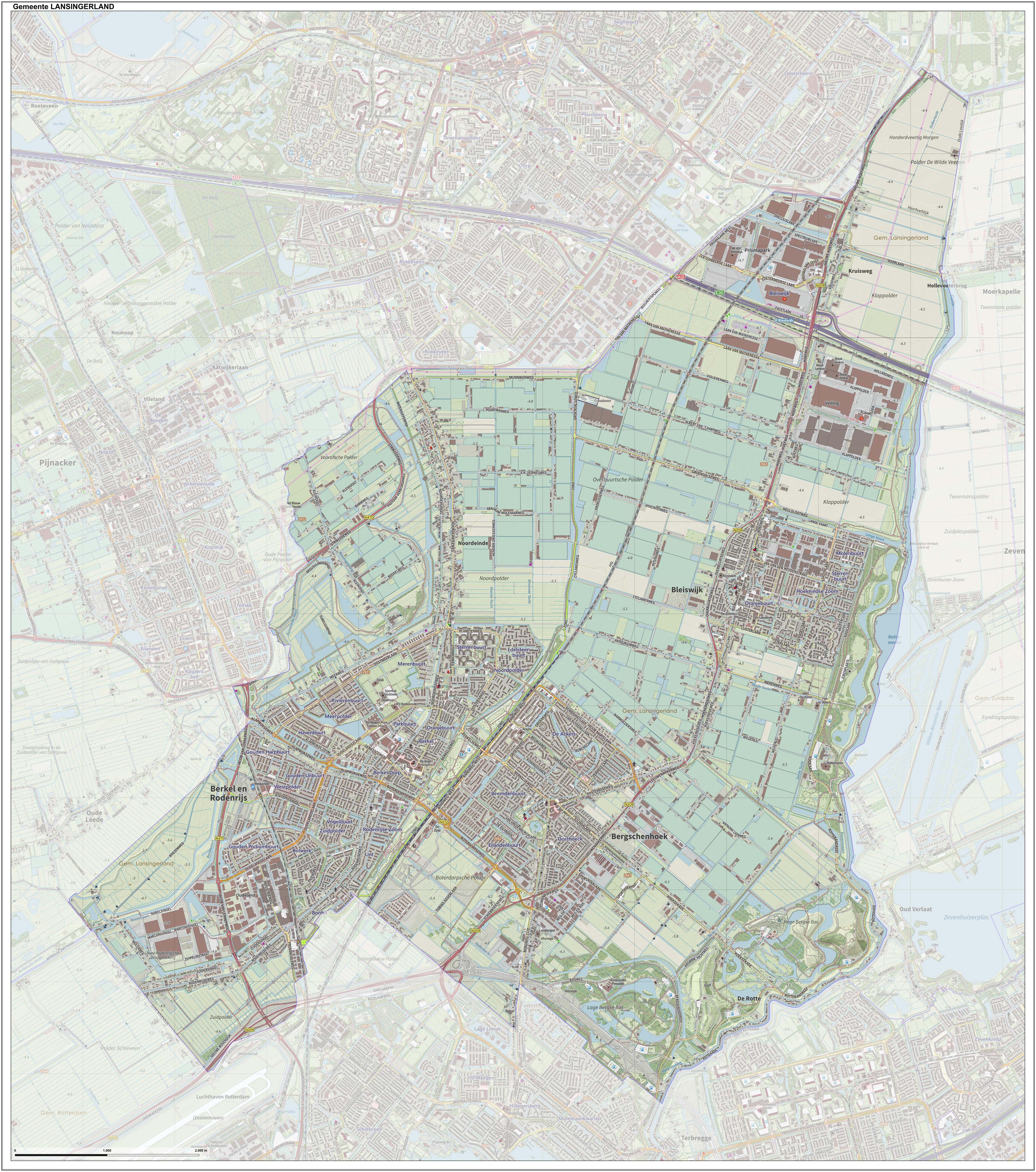 Topografische gemeentekaart. Resolutie: 400 pixels/km. Kaartbeeld samengesteld uit de open geodata van de Top10NL en Top25namen (Kadaster), Creative Commons-BY licentie. Gebouwvlakken uit open geodata BAG extract. Wegen uit de OpenStreetMap, OpenStreetMap community. Reliëfschaduw uit de Actuele Hoogtekaart AHN2. Samenstelling en kleurenschema: Jan-Willem van Aalst, met QGIS. Zie ook de Legenda.